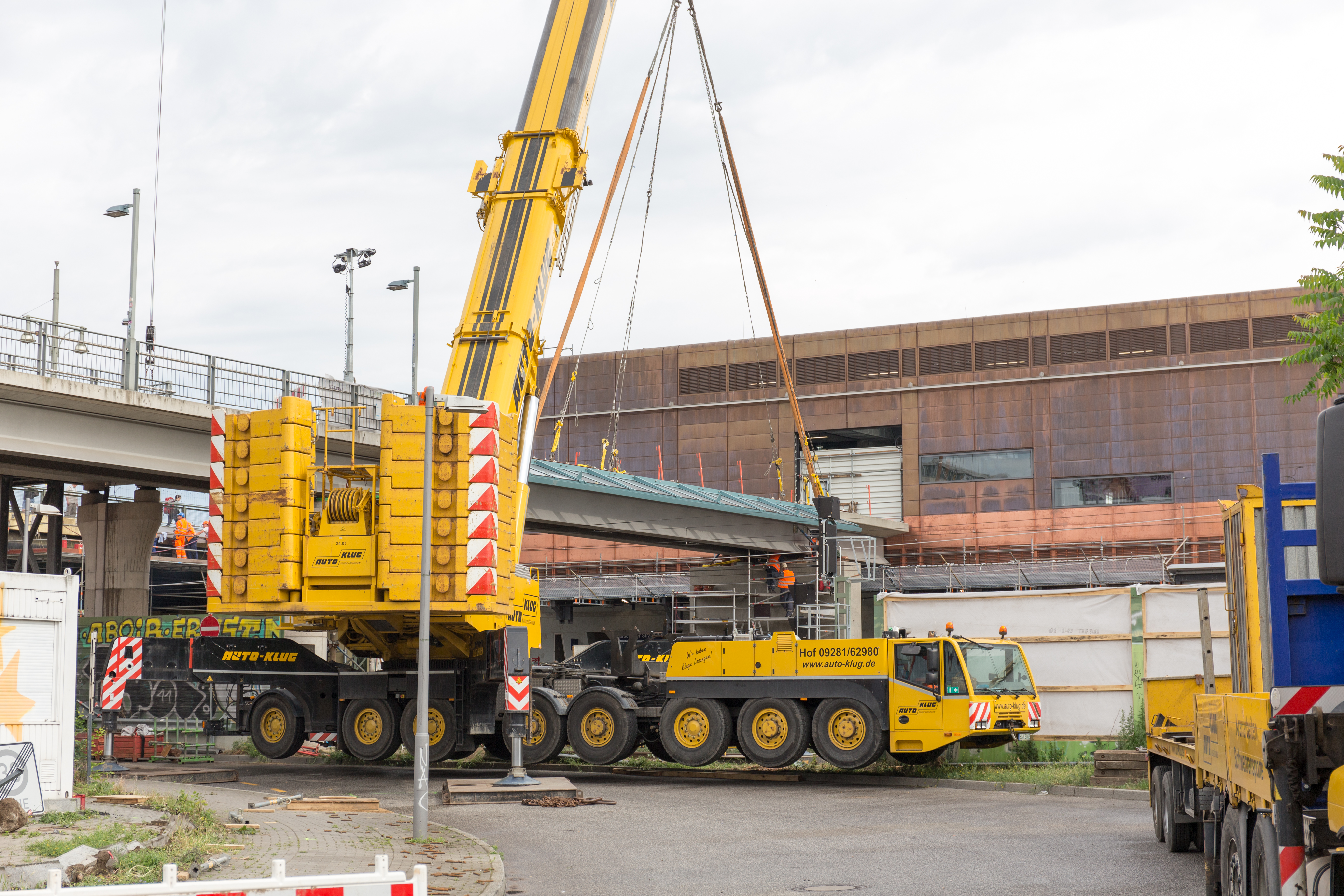 Bilder vom S-Bahnhof Warschauer Straße. Am 10. Juni 2019 wurde die neue Fußgängerbrücke eingehoben.